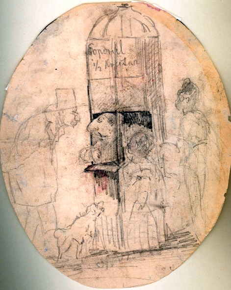 Nas Arabescu - Vânzător de ziare - Caricatură, nedatat. Tehnica:creion pe hârtie. Dimensiuni:167x137mm(oval). Semnătura:nesemnat. Inscripţii:inscripţie în creion, centru,sus:“Poporul½Kociţar”. Provenienţa:Col.E.Dragomirescu, Biblioteca Academiei Române, nr.inv.9101